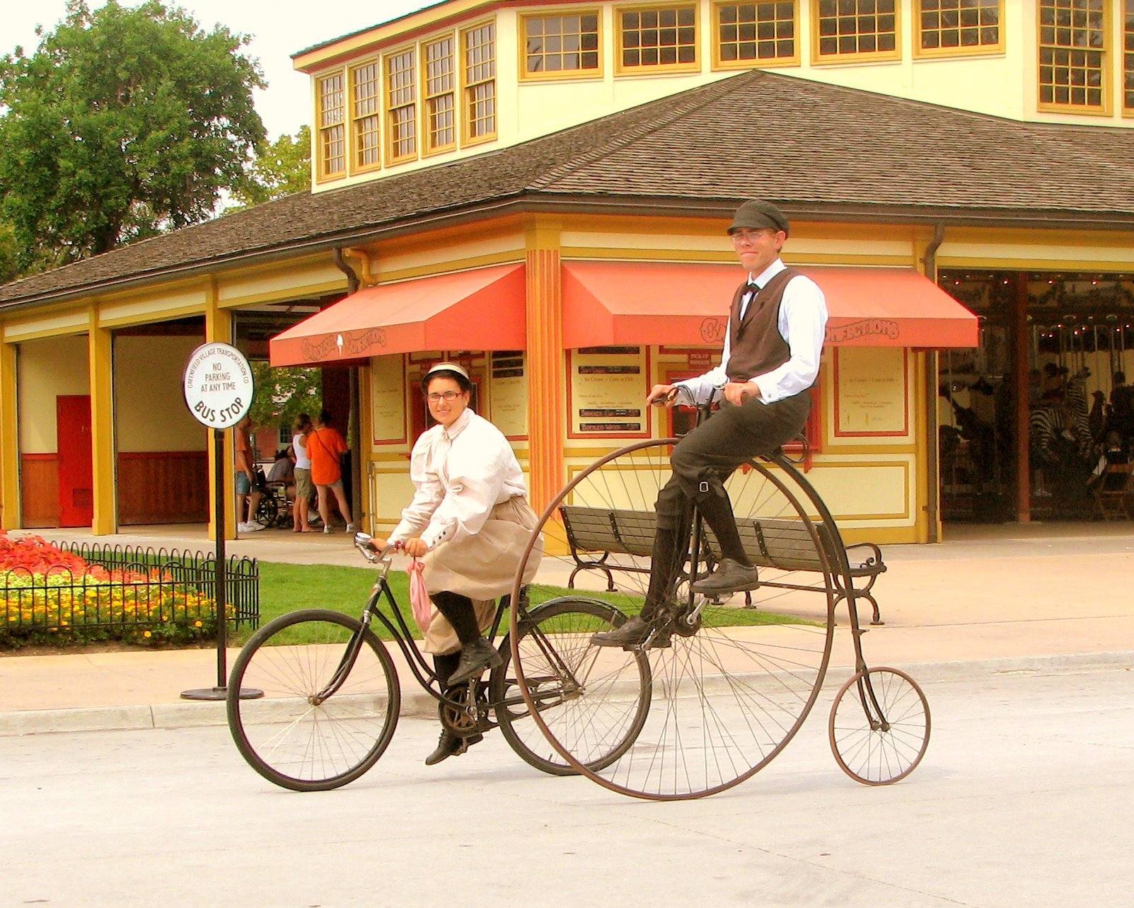 Greenfield Village - Dearborn, MI